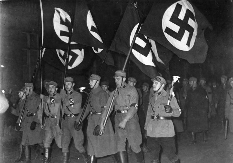 S.A. defiliert am Abend des 30. Januar 1933 vor dem Reichskanzler Palais in der Wilhelmstraße.